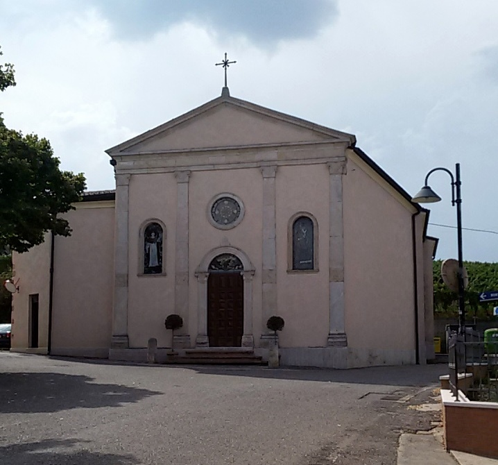 Chiesa parrocchiale di S. Vincenzo Ferrer in Fittà.